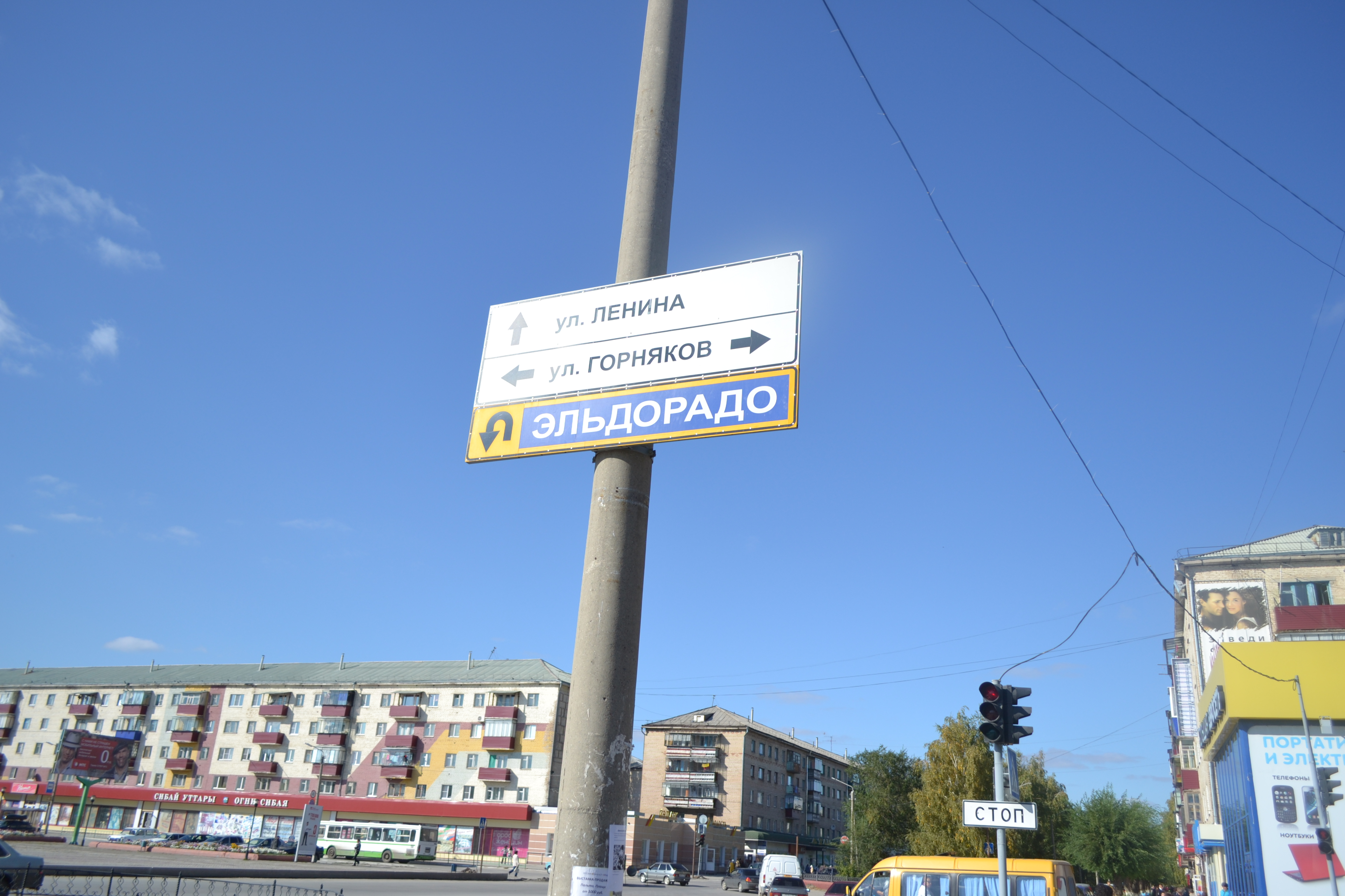 Указатель на Сибайской площади